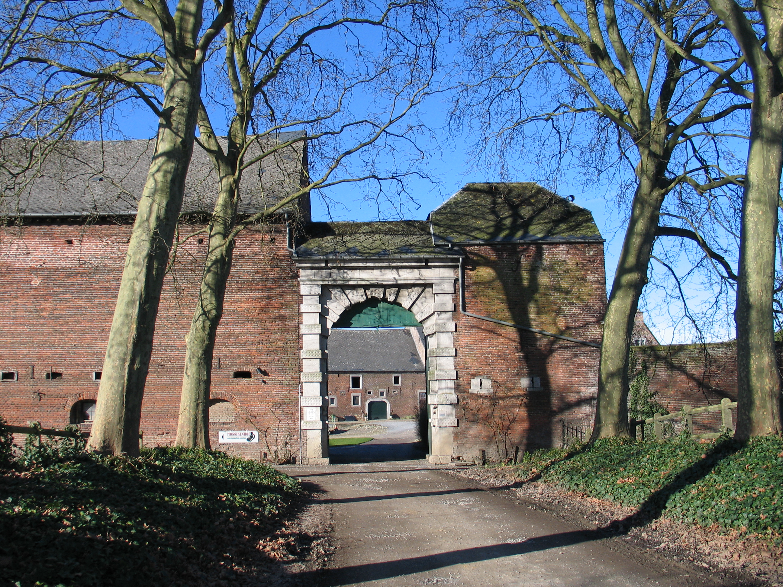 Monnikenhof te Heks, België